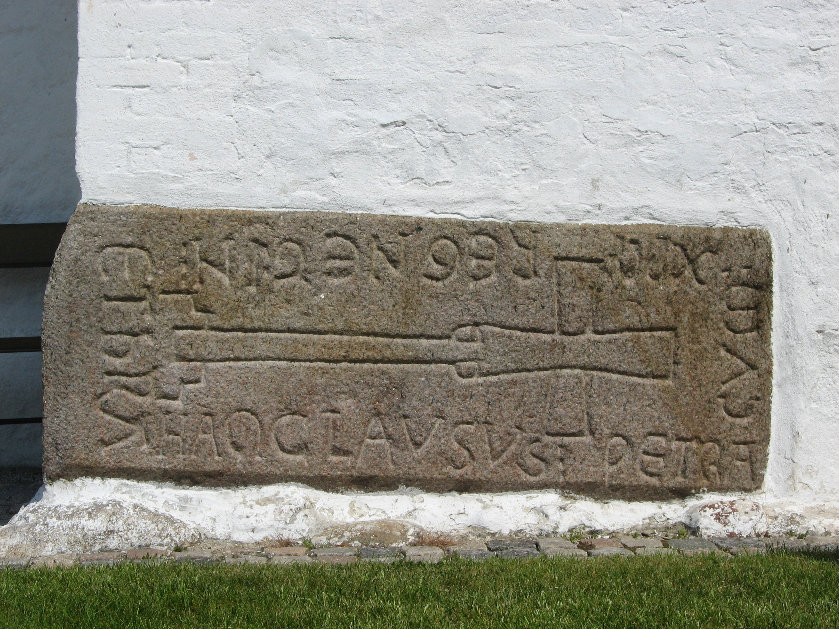 Brabrand Kirke in Brabrand Sogn in Århus Kommune, Denmark.